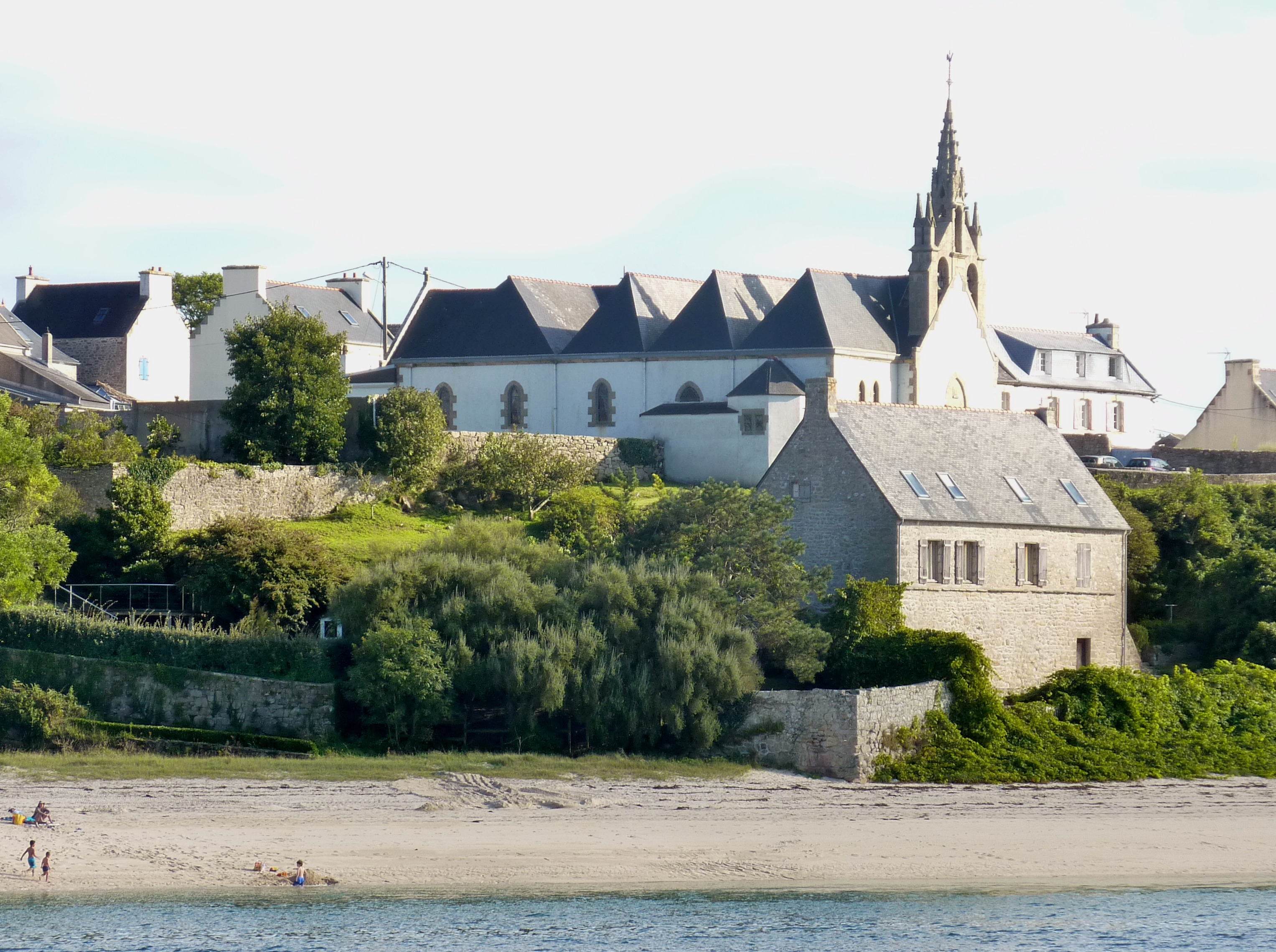 Poulgoazec et son église Saint-Julien-l'Hospitalier vus depuis le port d'Audierne ; au premier plan, l'estuaire du Goyen.